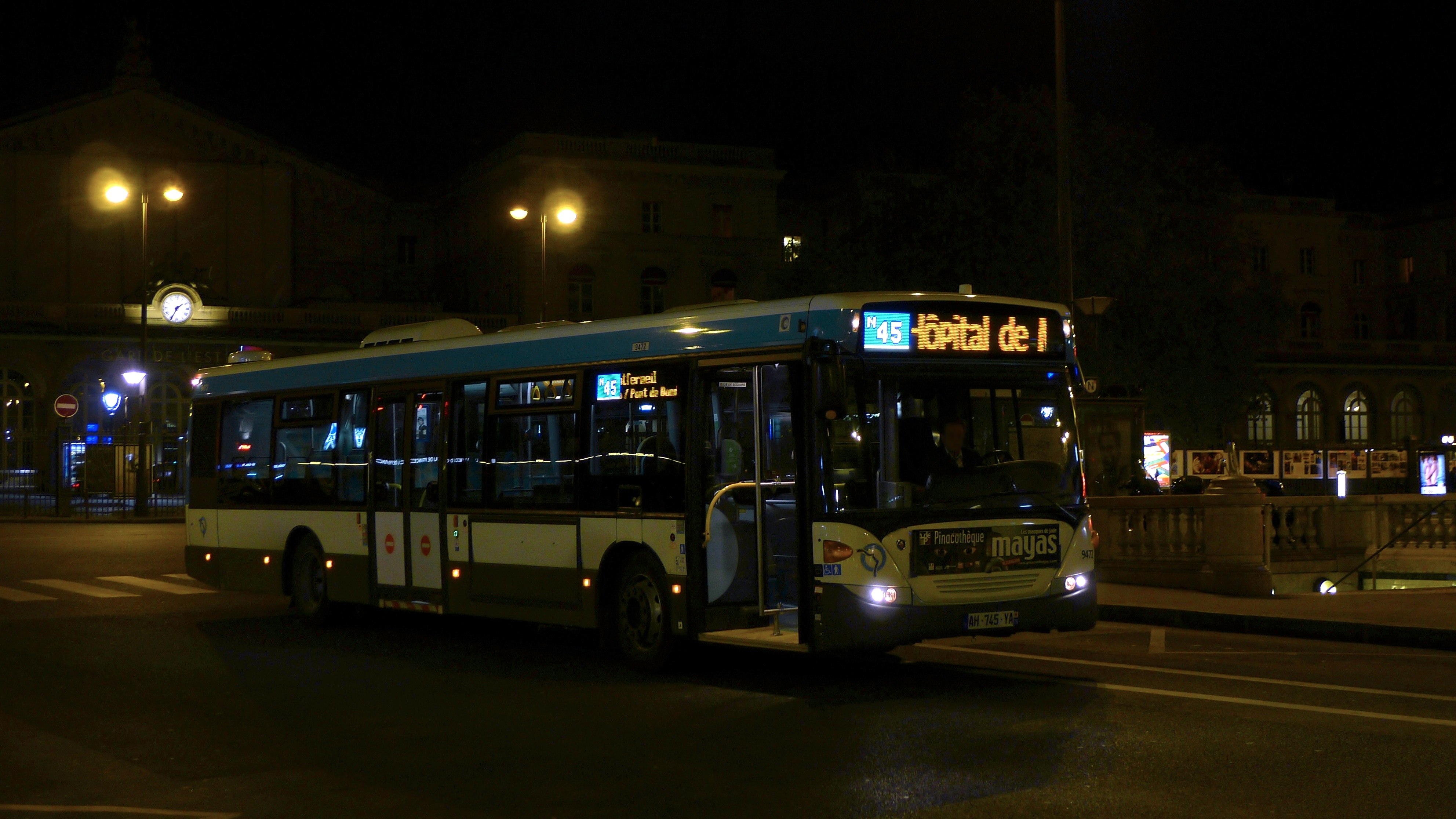 Scania RATP 9472 sur le N45 en attente à la Gare de l'Est